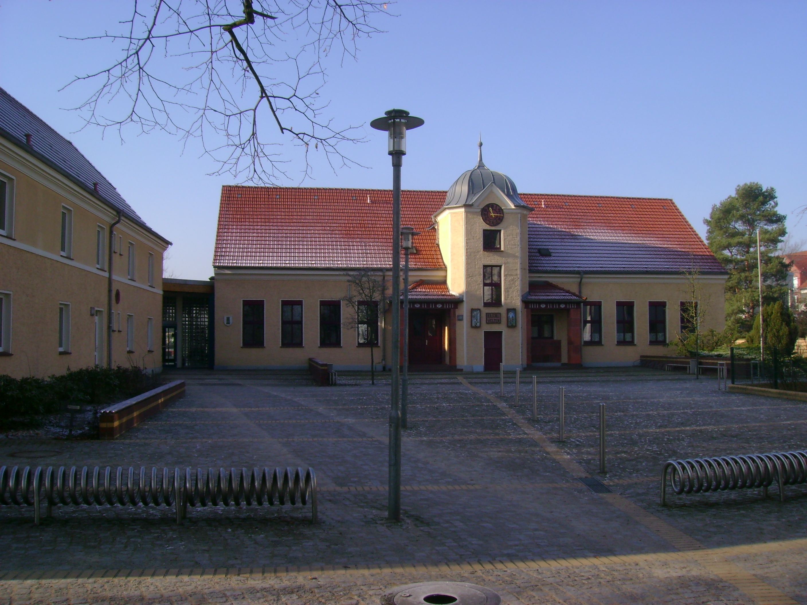 Real Schule in der Breiten Straße in Velten